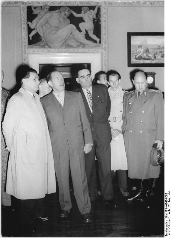 Zentralbild/Zühlsdorf 23.5.1957 CSR-Delegation in Nordhausen und Weimar. Das Reiseziel der tschechoslowakischen Regierungsdelegation war am 22.5.1957 der VEB Schwermaschinenbau Nordhausen, die Stadt Weimar und Eisleben. UBz.: Die Delegation besucht das Goethehaus in Weimar. Links: Ministerpräsident Viliam Siroky